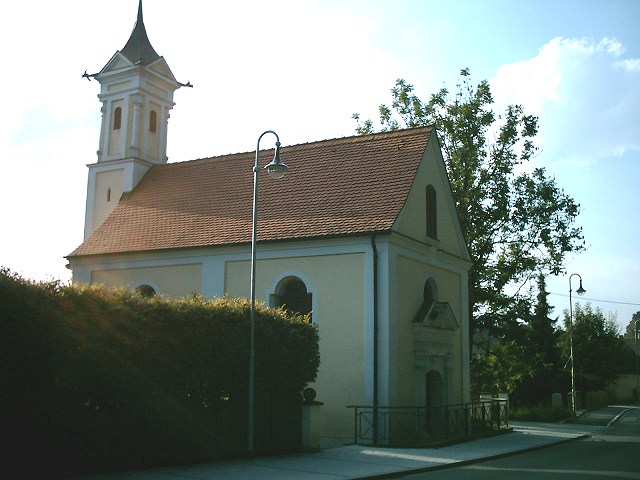 Michaels-Kapelle in Affing, Bayern